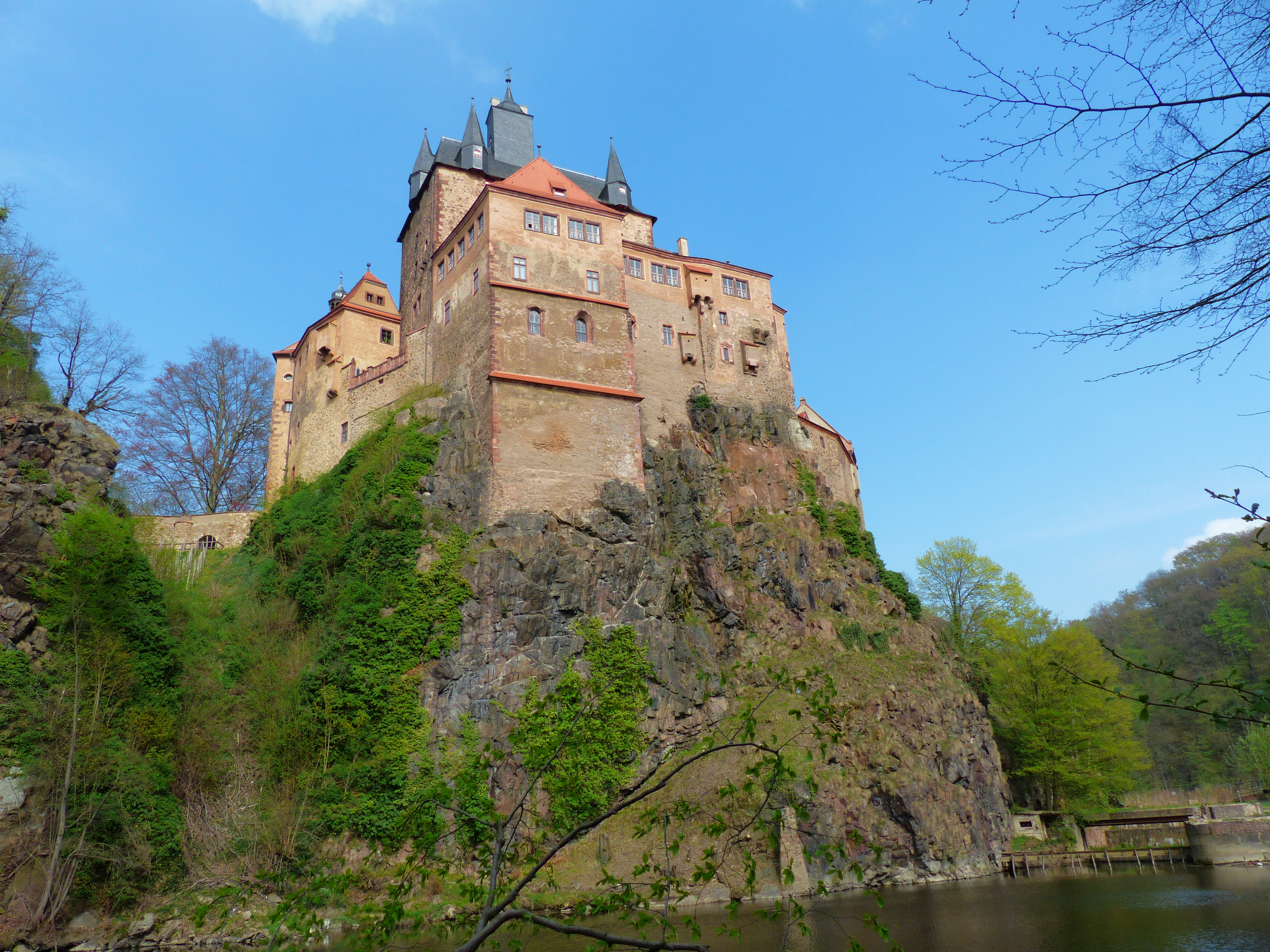 Burg Kriebstein über dem Zschopautal